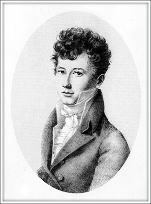 Carlo Vidua